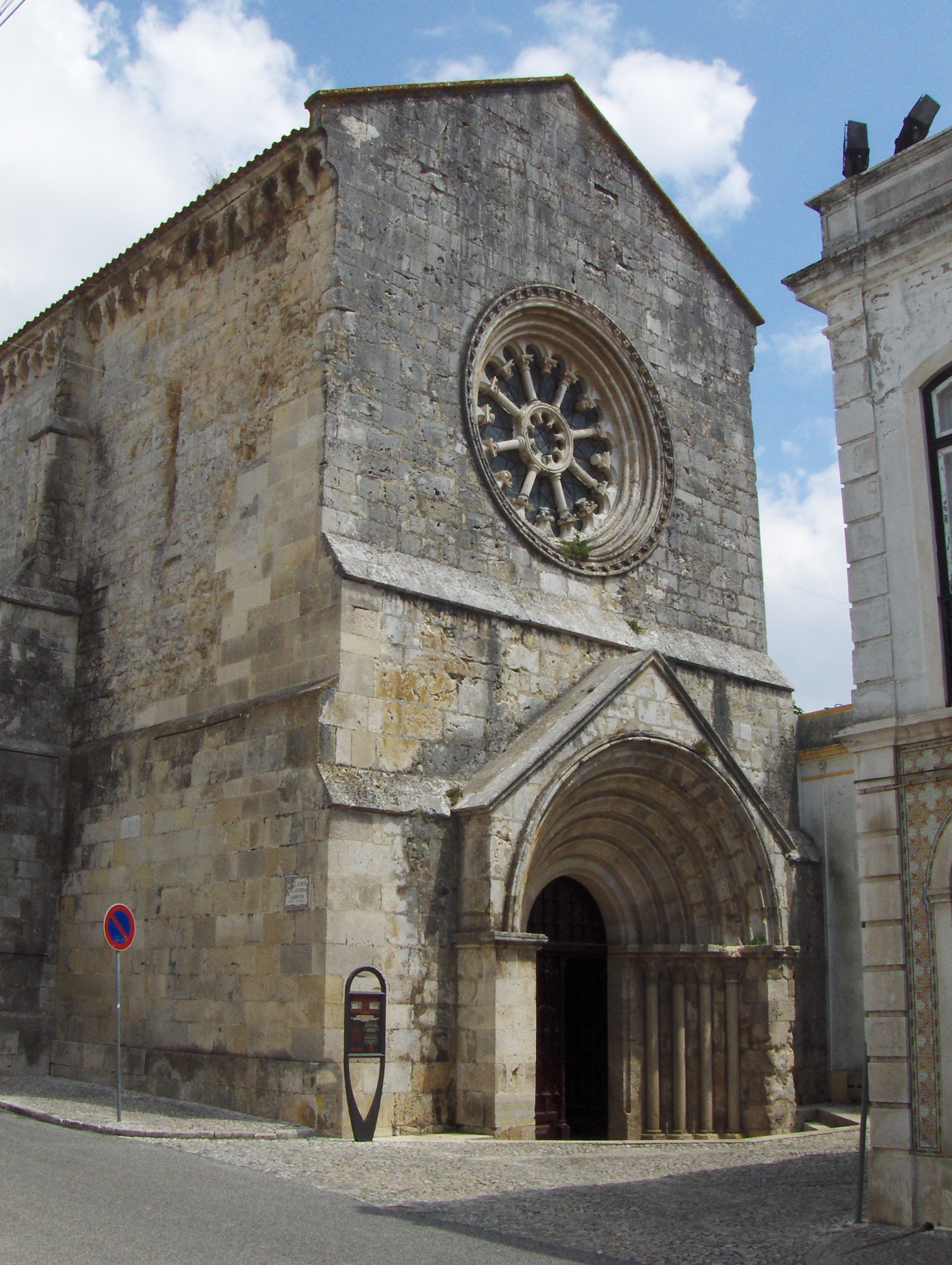 Igreja de São João de Alporão This file was uploaded for Wiki Loves Monuments in Portugal with the unique identifier 70434.